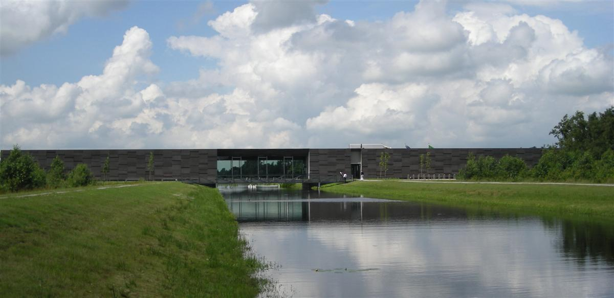 Museum Belvedere